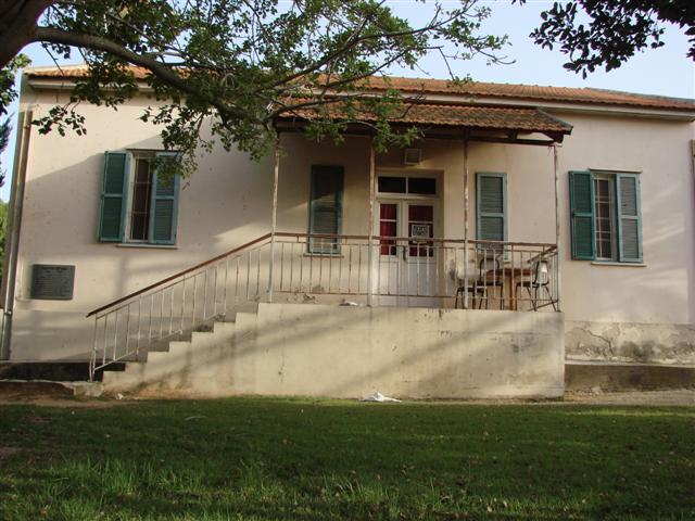 בית דווידסקו